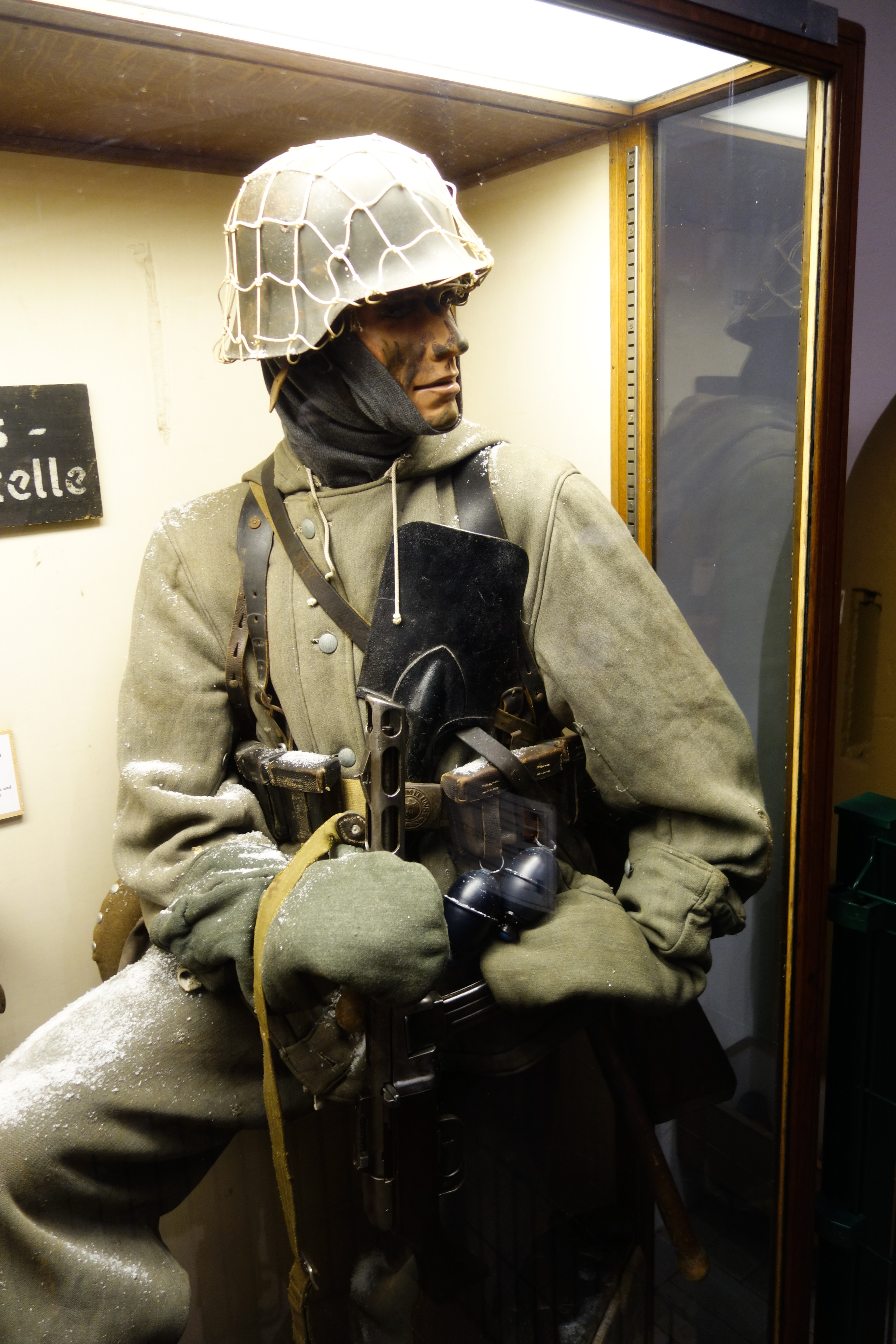 Luxembourg 2015